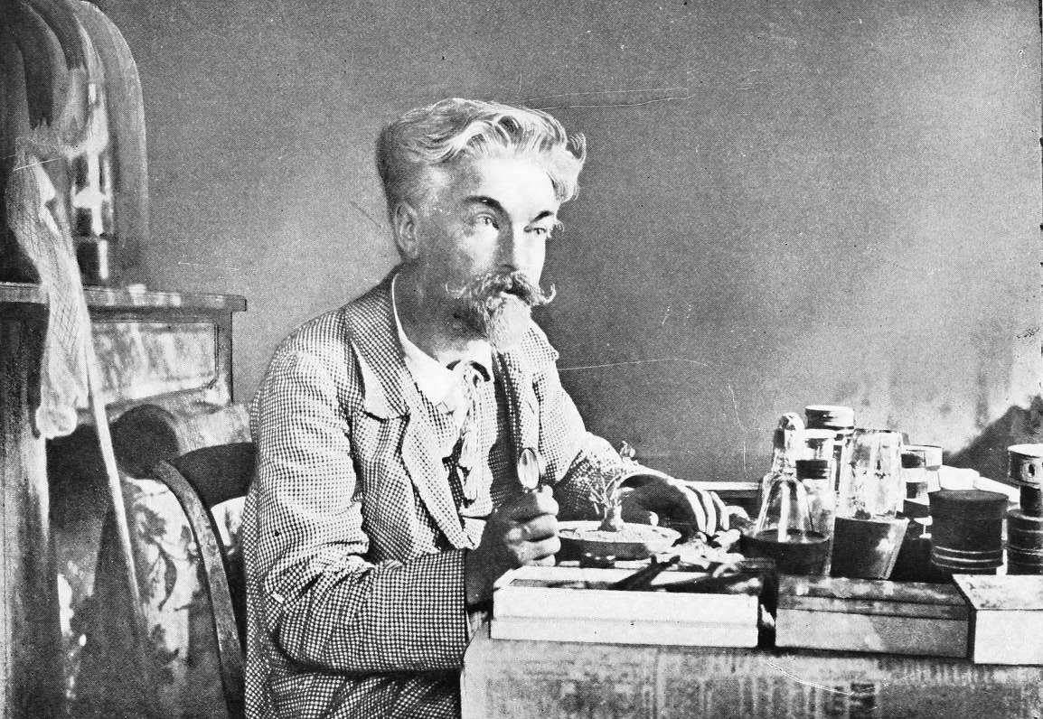 Pierre Chretien, French entomologist